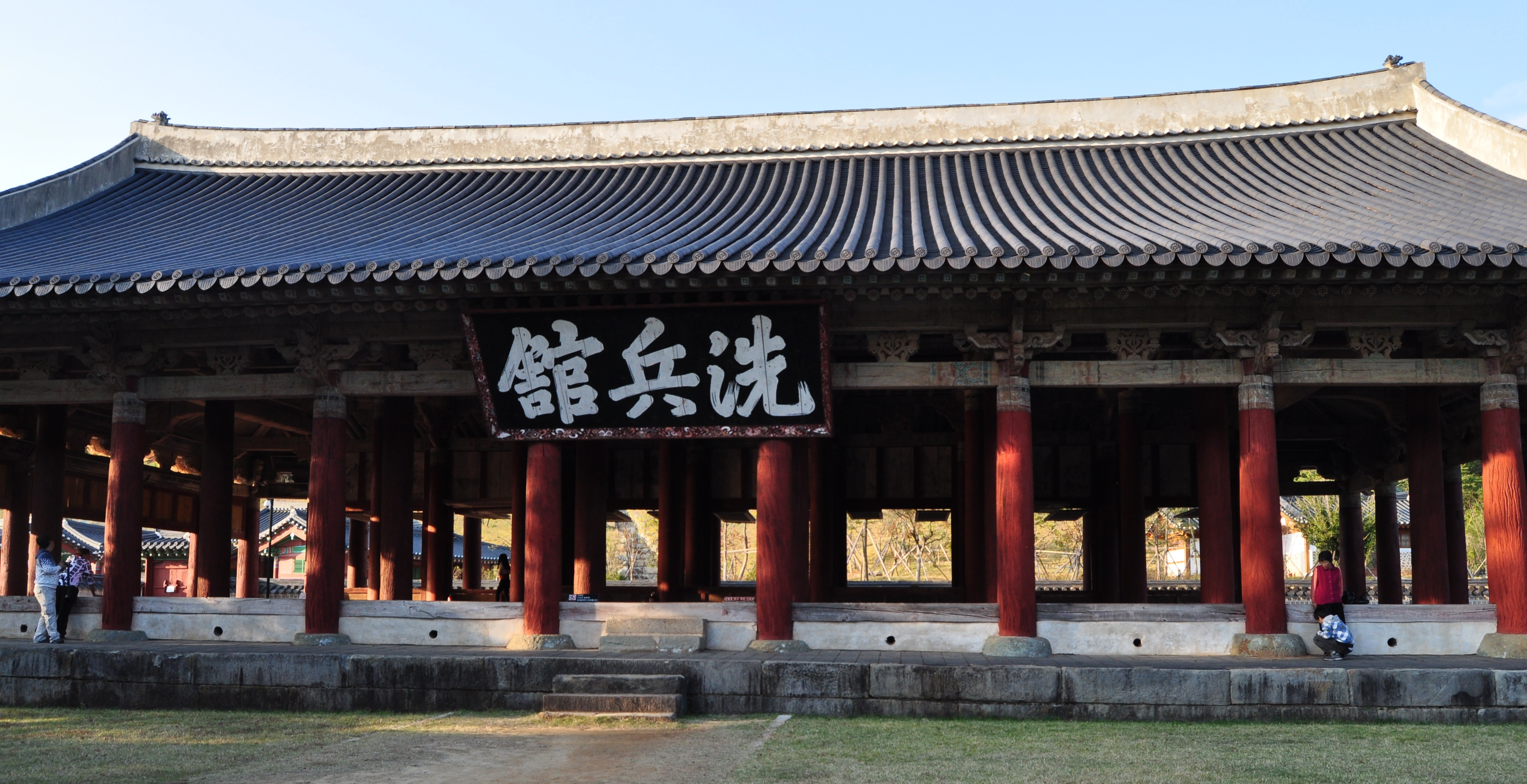 통영 세병관 (대한민국 국보 제305호)